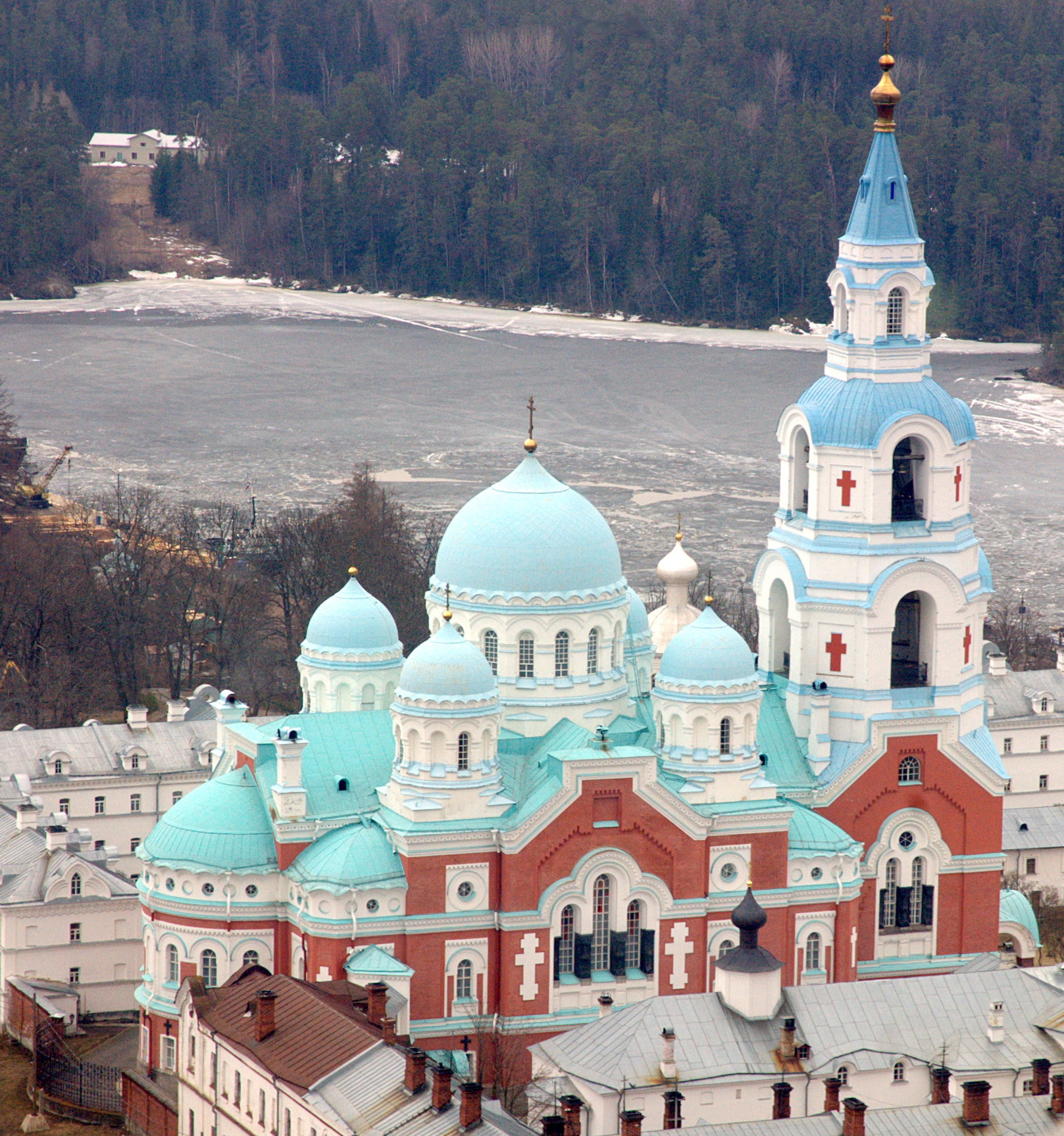 Спасо-Преображенский собор Валаамского монастыря (1896).